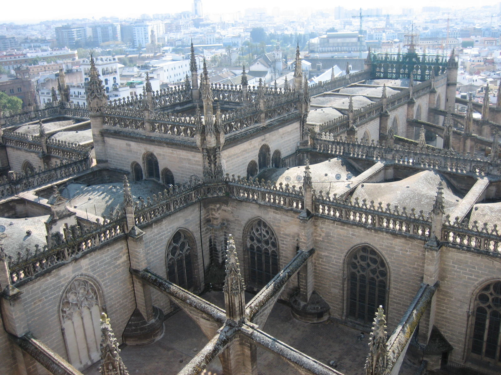 Catedral Cátolica de Sevilla